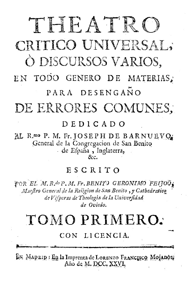 Theatro crítico universal ó discursos varios en todo género de materias, para desengaño de errores comunes ... escrito por ... Benito Geronimo Feijoo, tomo primero, MDCCXXVI.